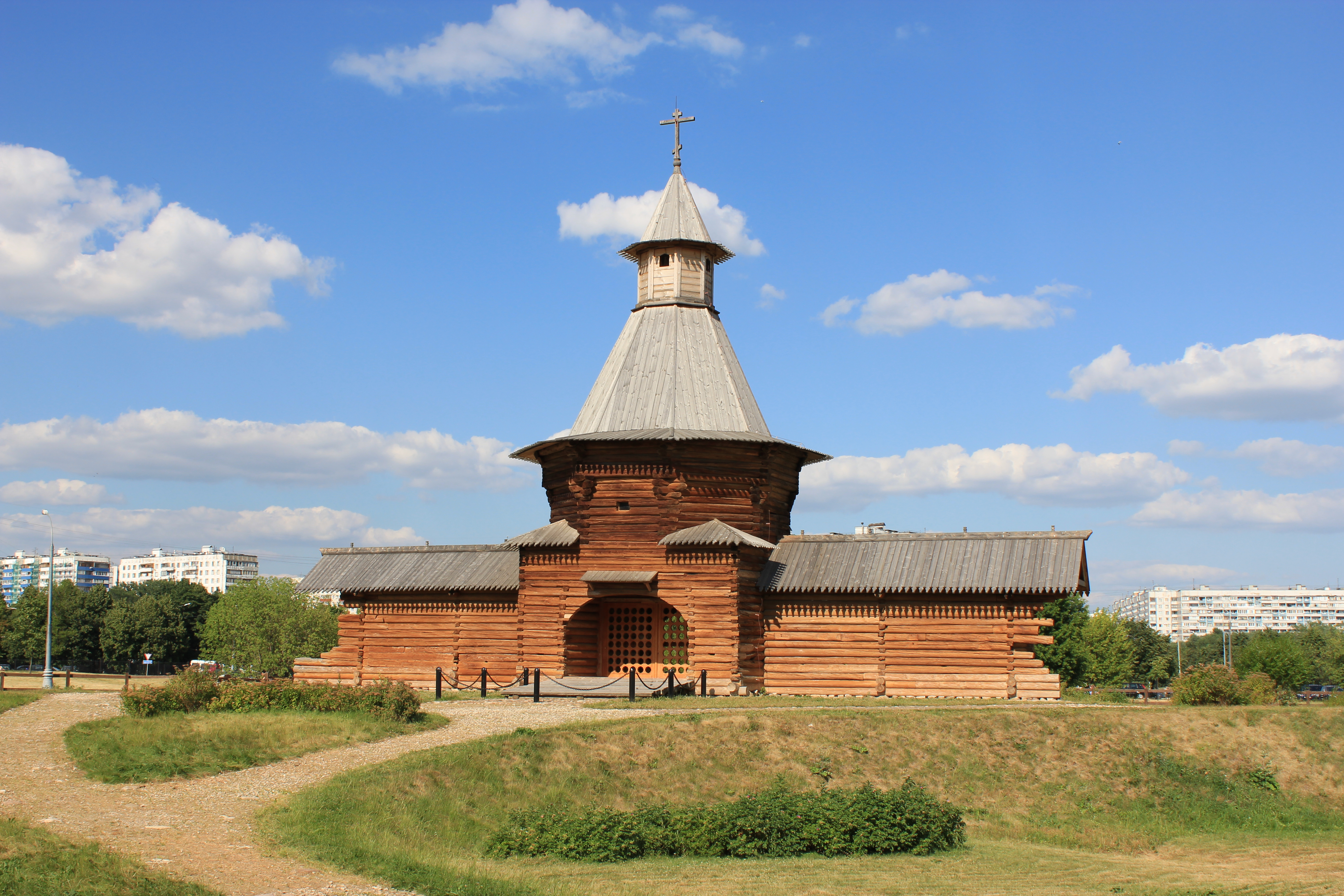 Надвратная башня Николо-Карельского монастыря (в настоящее время территория города Северодвинск). В 1932 году перевезена в Коломенское.